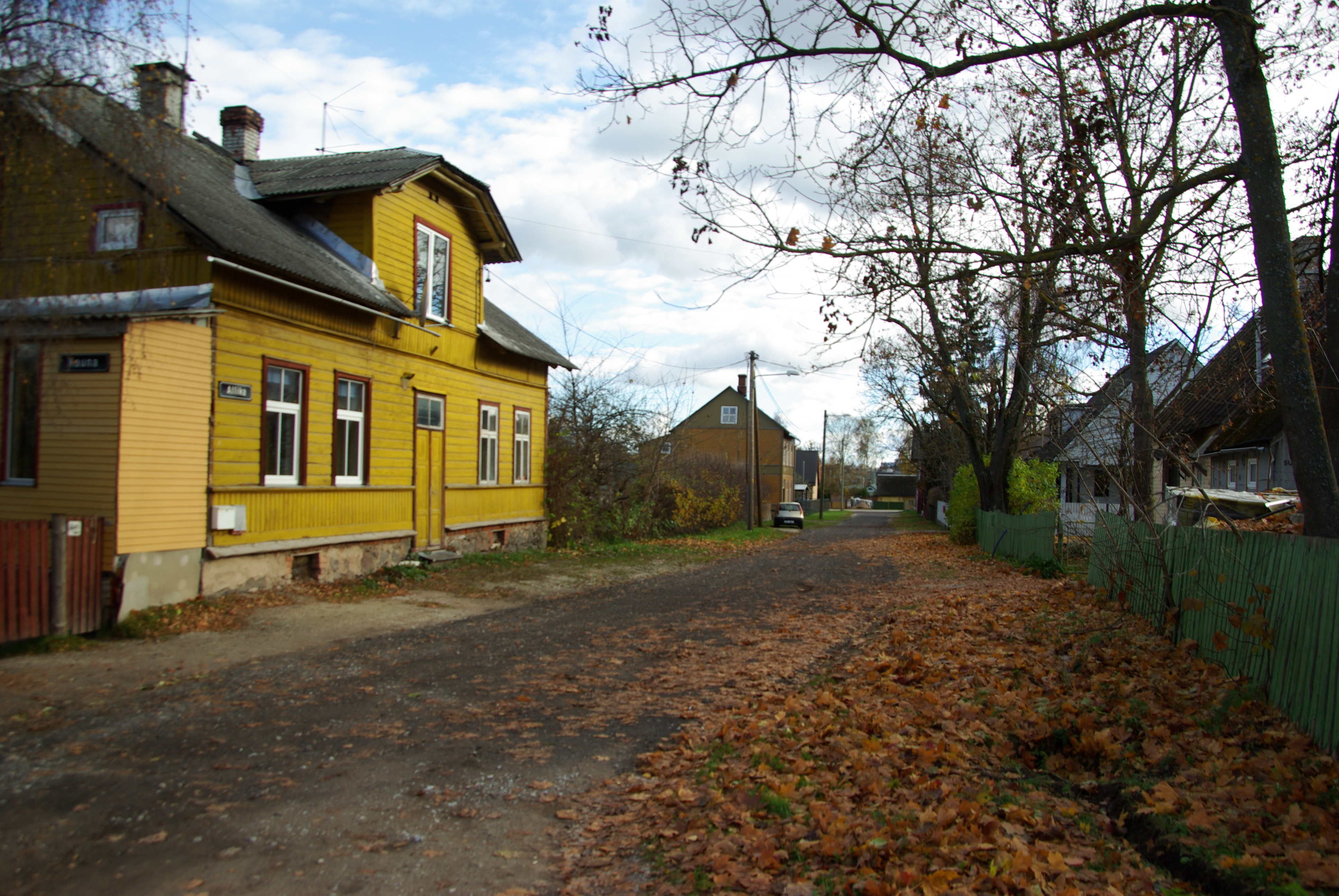 tänav Tartus, Supilinnas